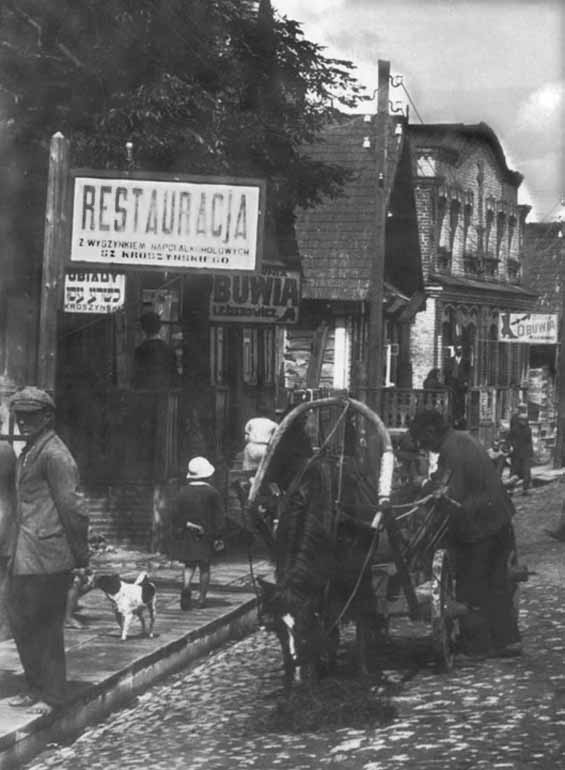 The Jewish Street (Uliczka Żydowska) in Zdzięcioł, eastern Poland, prewar Województwo Nowogródzkie.